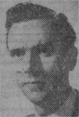 Arkitekten Sten Cassel